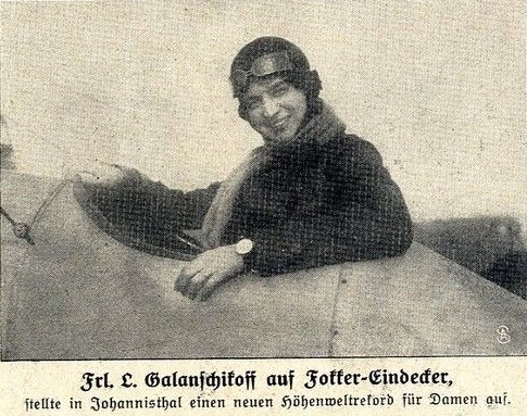 Fräulein Ljuba Galanschikoff auf Fokker-Eindecker stellte in Johannisthal einen neuen Höhenweltrekord für Damen auf